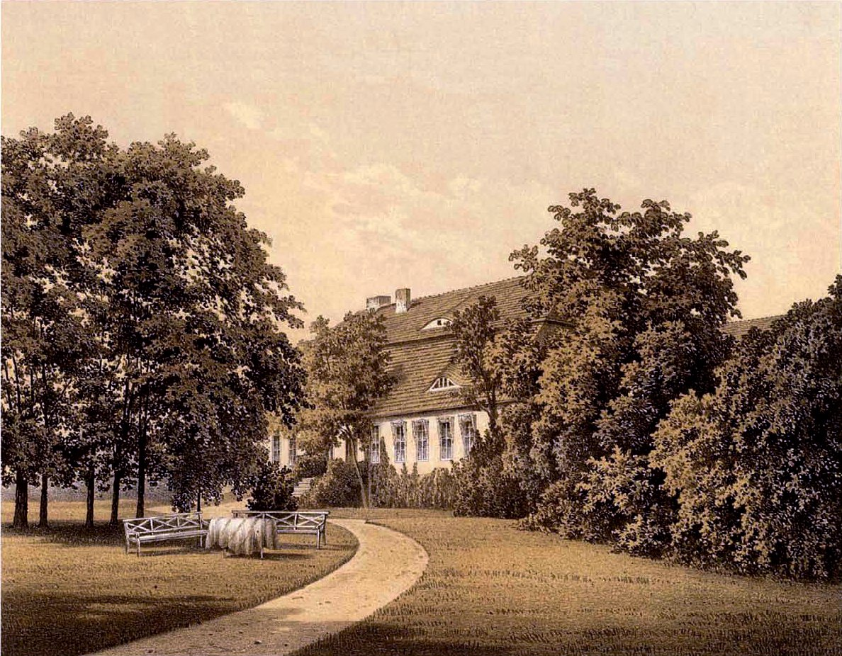 Rittergut Stöllen